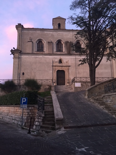 Esterno della chiesa di Santa Maria Maggiore